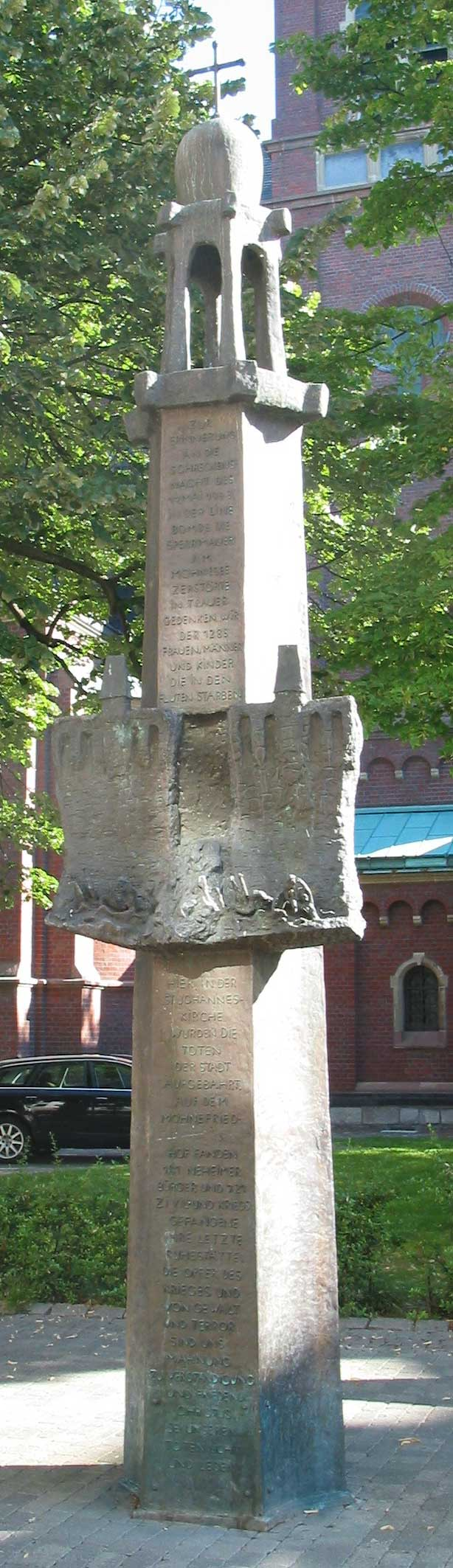 Totenstele/Denkmal für die Opfer der Möhnekatastrophe, Hauptstraße, Neheim